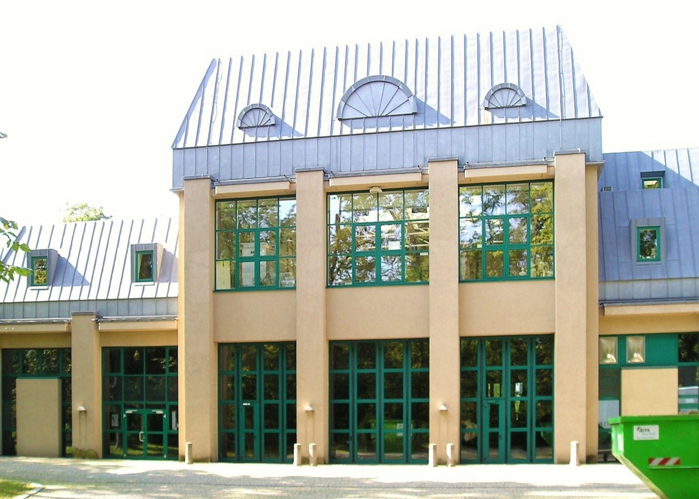 Kulissenhaus des Meininger Theaters